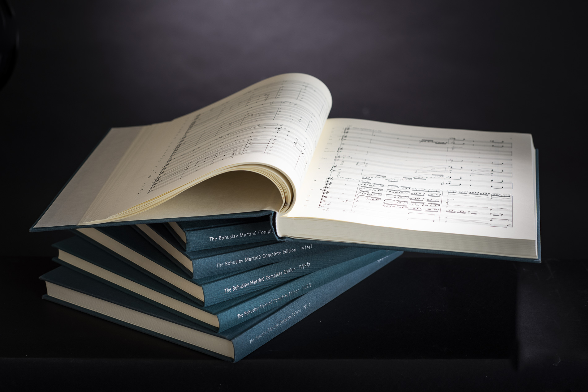 První svazky Souborného vydání děl Bohuslava Martinů (Bohuslav Martinů Complete Edition)